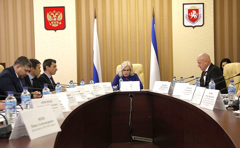 Под председательством сенатора от Крыма Ольги Ковитиди состоялось заседание «круглого стола», посвященное актуальным вопросам развития конкурентных отношений и соблюдения антимонопольного законодательства хозяйствующими субъектами Республики Крым